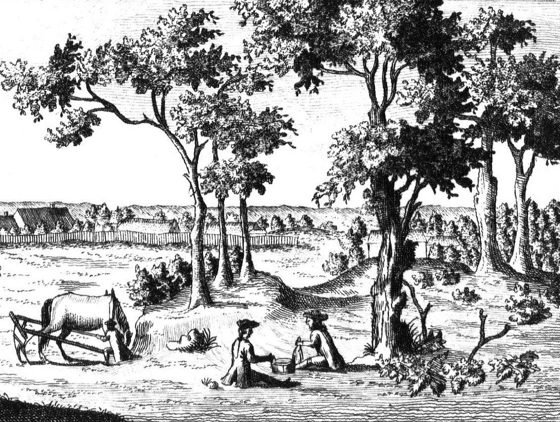 Johann Heinrich von Denffers Mitarbeiter bei der Herstellung von Bodenproben